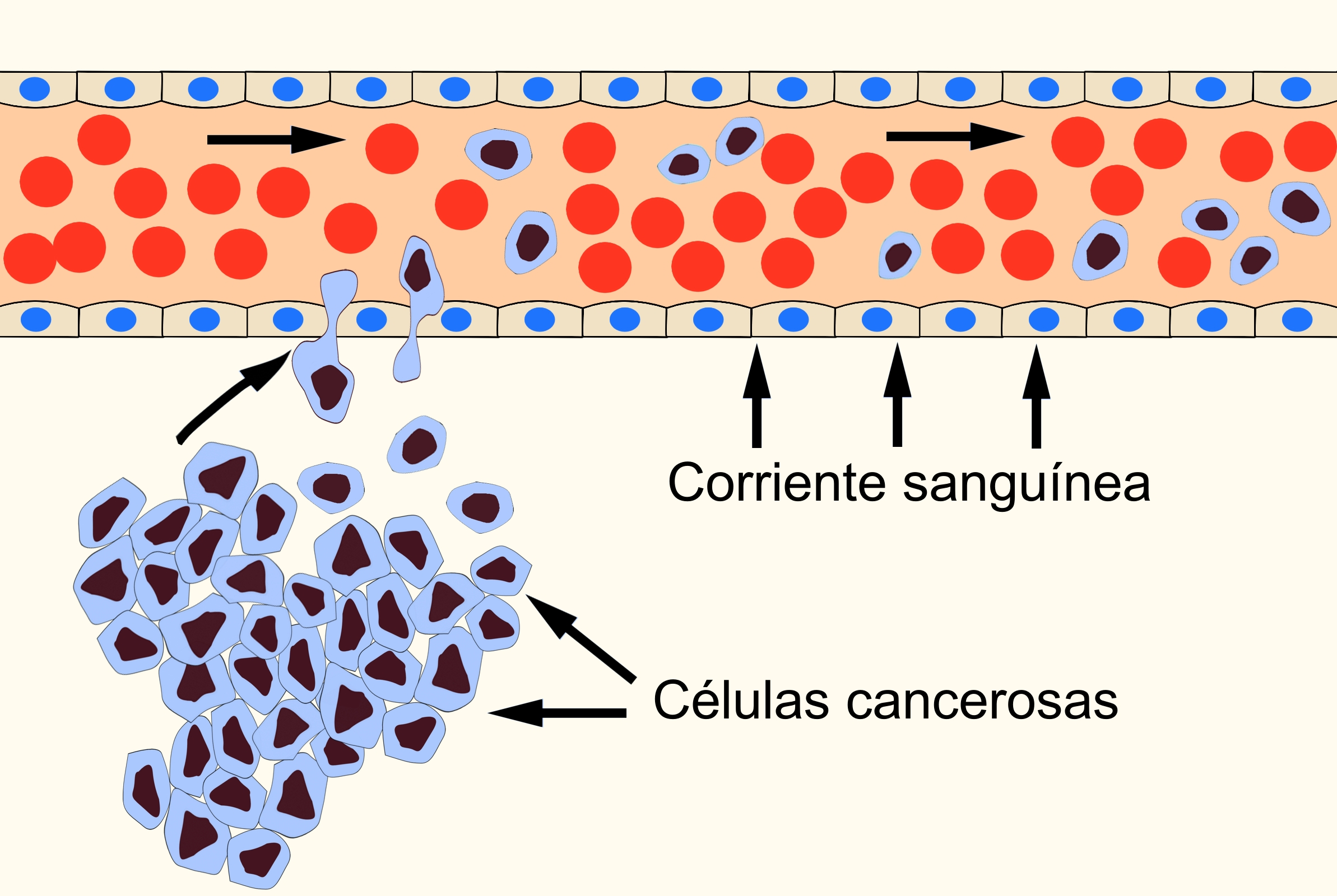 Esquema en el que se muestra la diseminación de las células cancerígenas a través de la sangre (metastasis hematógena).